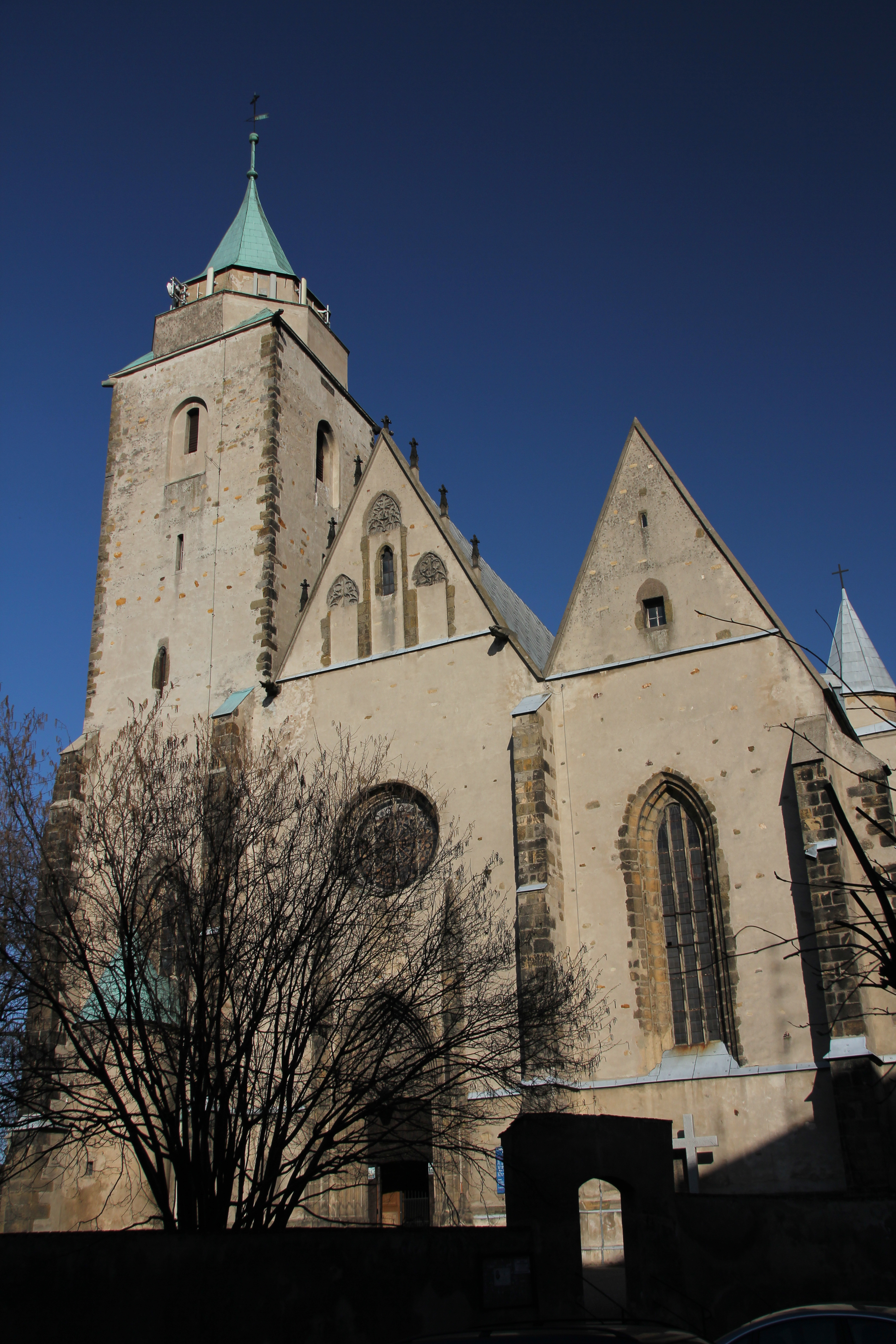 Jawor, pl. Kościelny - kościół parafialny p.w. św. Marcina, XIII-XIX (zabytek nr rejestr. A/1899/79)